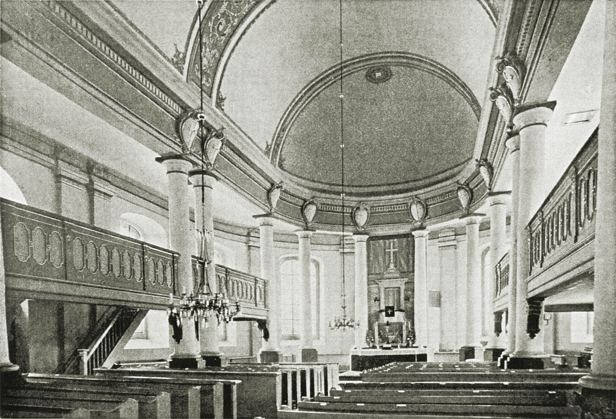 Fotografie des Innenraums der Litauischen Kirche in Tilsit